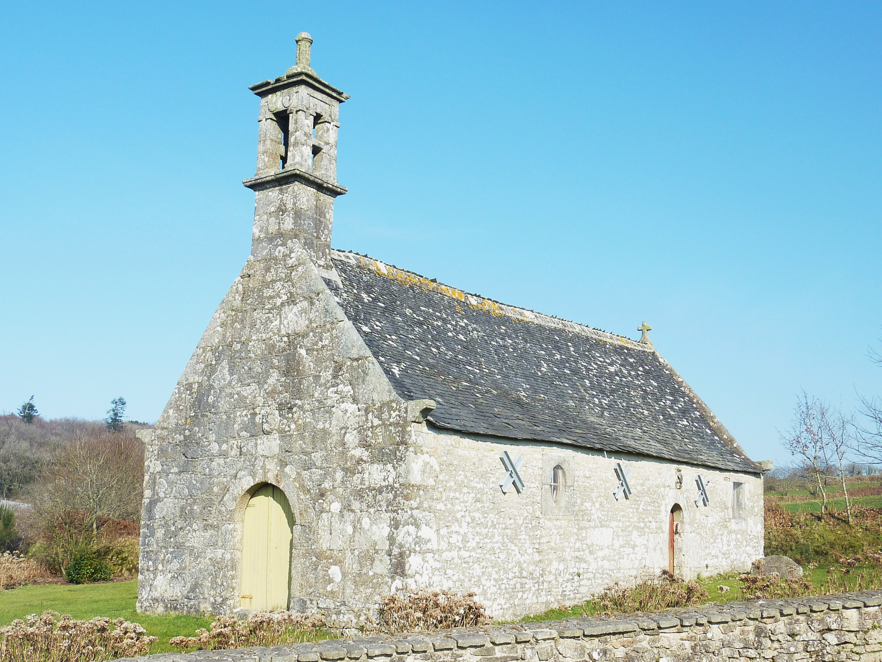 Plounéour-Ménez : la chapelle Saint-Divy, construite en 1655 (date portée sur le clocheton). Une pierre encastrée au-dessus de la porte sud porte les armoiries de la famille Le Scanff, propriétaires du manoir de Penhoat. La fenêtre sud éclairant le choeur a été agrandie au XIXe siècle.